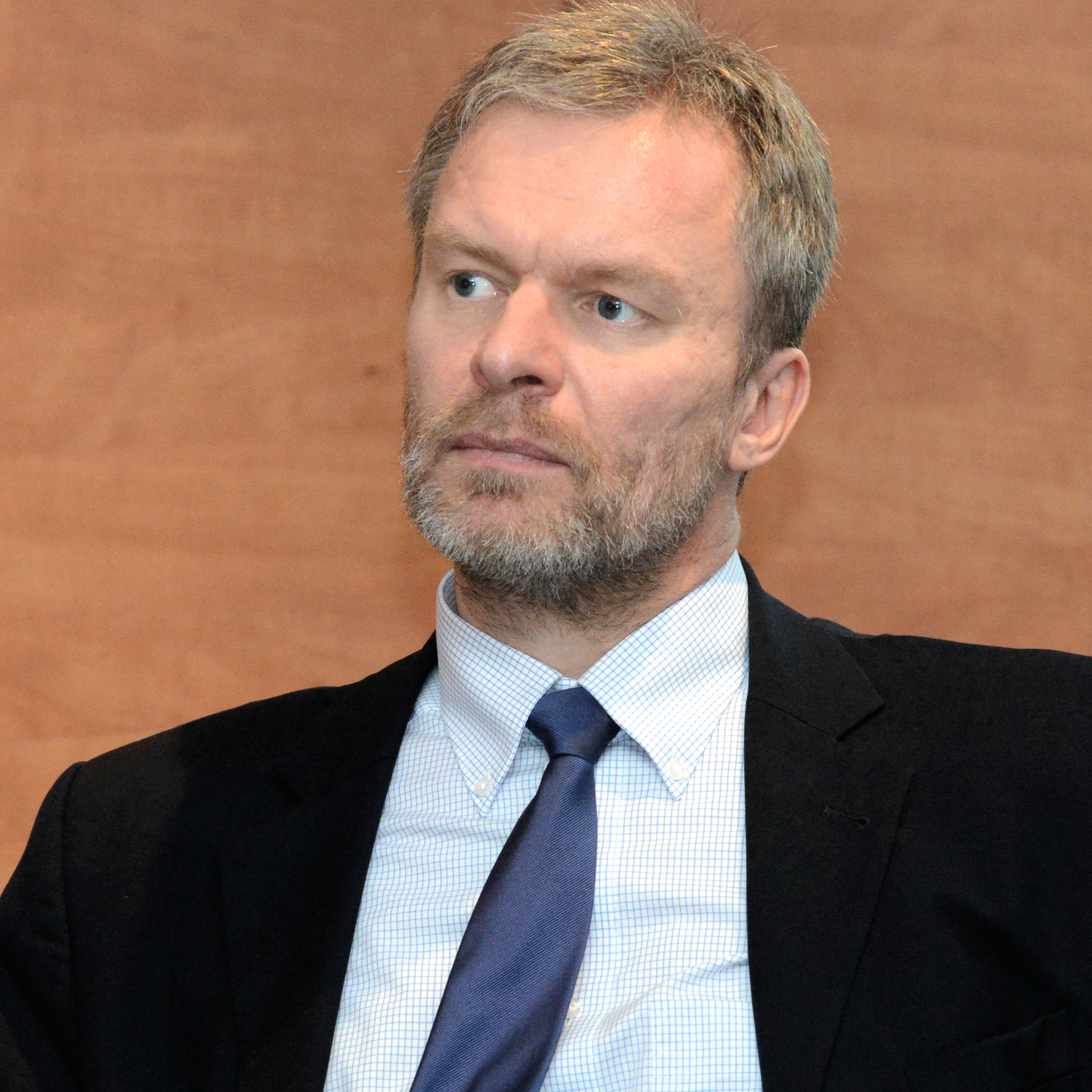 Thomas Oberreiter, Ambassadeur d'Autriche à Luxembourg, au Cube 521 à Marnach. Le 18 décembre 2014, sur initiative de l'ambassade du Royaume-Uni, une délégation de diplomates visita le couvent de Cinqfontaines. Entre 1941 et 1943 ce site servait à l'occupant allemand de camp d'internement de la population juive. La délégation fut accueillie par le Père Jean-Jacques Flammang de la Congrégation des prêtres du Sacré-Coeur qui offrit le petit déjeuner et présenta le couvent. Lors d'une visite des lieux, l'historien Marc Schoentgen décrivit les conditions de vie extrêmes des personnes internées qui furent transférées par après vers les camps de concentration d’Auschwitz, de Theresienstadt (Térézin), de Litzmannstadt (Lodz) et d’Izbica. L'architecte Christoph Rosenberg présenta le projet d'un «Centre de rencontre et de mémoire de la Shoah» à cet endroit historique et Henri Juda, président de MemoShoah, détailla en profondeur le concept, qui a le support de la Congrégation des prêtres du Sacré-Coeur. La délégation se rendit ensuite à Marnach au Cube 521 où elle fut accueillie par la directrice Odile Simon qui présenta le Centre culturel et invita à un déjeuner campagnard. L'historien Paul Dostert y retraça l'histoire de la persécution de la population juive luxembourgeoise pendant la Seconde Guerre mondiale et informa des récentes découvertes historiques à ce sujet.